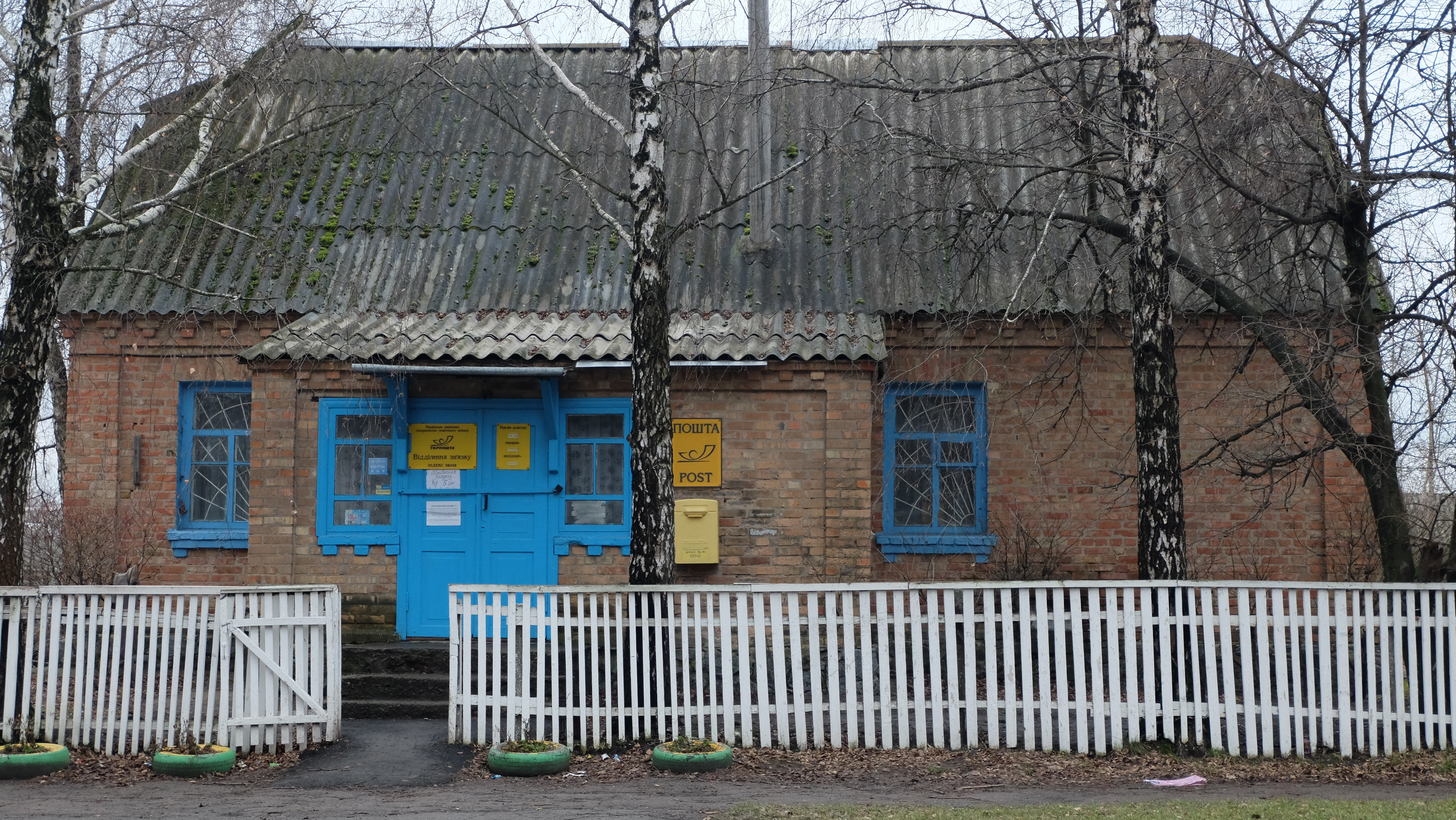 Пошта, село Стави